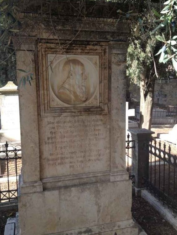 Grabmal der Eheleute Samuel Gobats (Crémines *26. Januar 1799-12. Mai 1879* Jerusalem) und Marie Zellers, verh. Gobat (Zofingen *9. November 1813-1. August 1879* Jerusalem), Zionsfriedhof Jerusalem